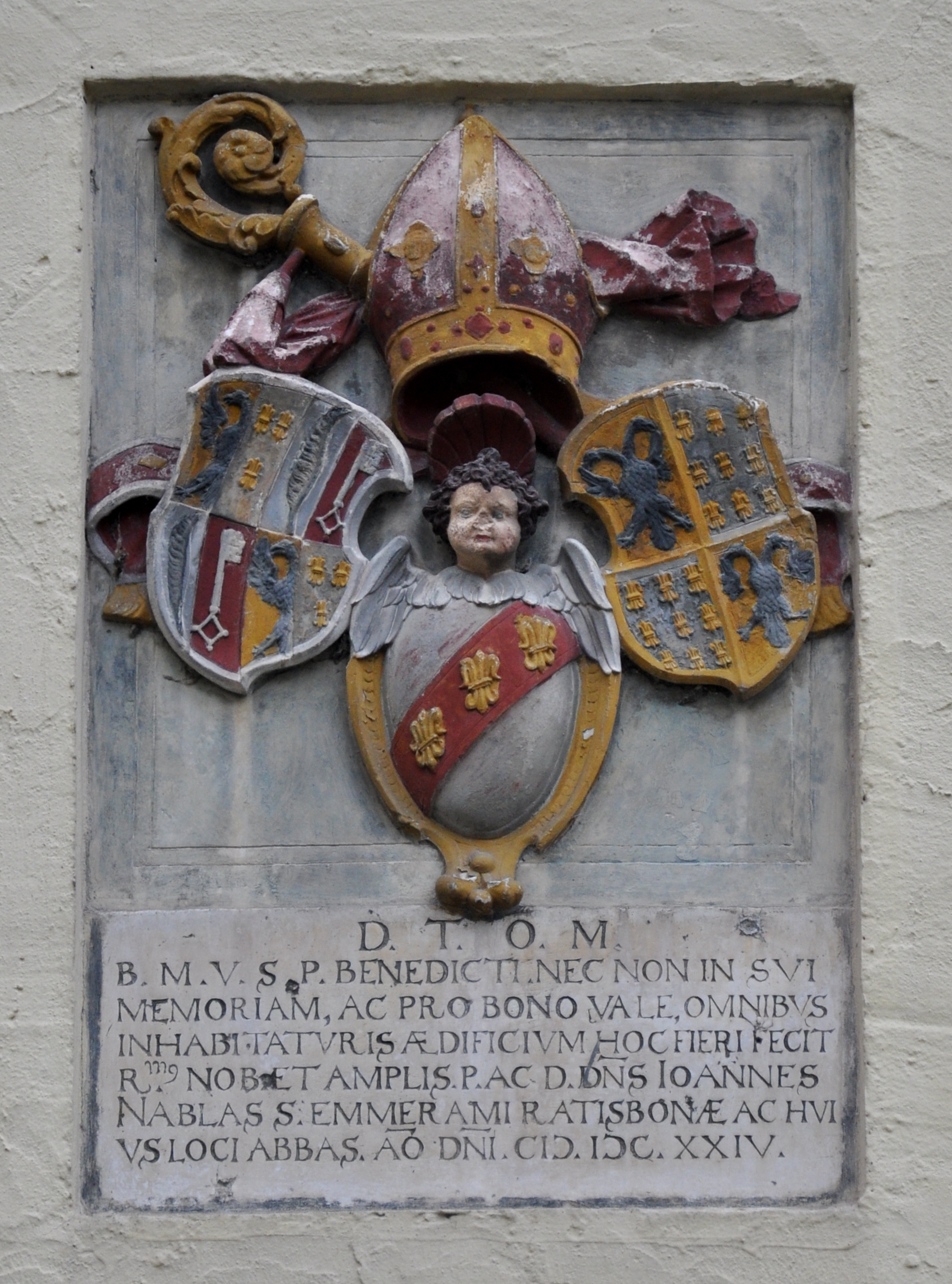 Kloster Metten Klosterhof, Wappentafel von 1624 links (heraldisch rechts): Wappen des Klosters St. Emmeram in Regensburg Mitte: Wappen des Abts Johannes Nablas (Nablaß) von 1624 (Abt von St. Emmeram und Metten) rechts (heraldisch links): Wappen des Klosters Metten